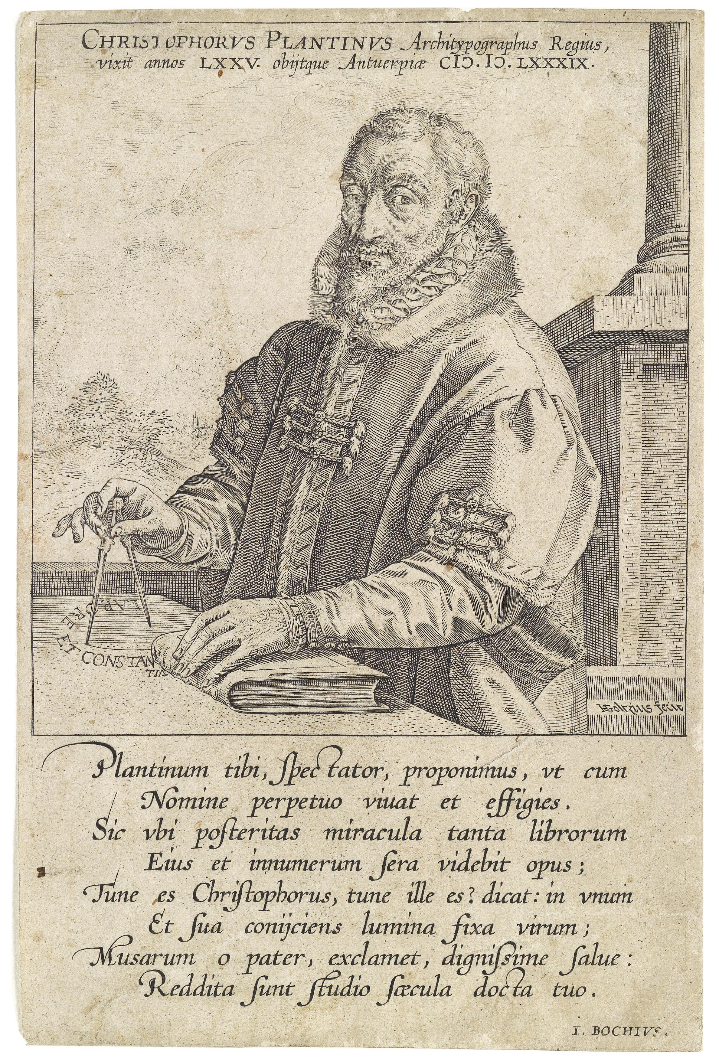 Christophe Plantin, Kupferstich um 1590, in der Platte signiert HGoltzius fecit, bezeichnet "I. Bochius", 20,5 x 13,5 cm (Blattgröße) Zeitgenössischer Abdruck des VI. Zustandes (von VI), mit der Bezeichnung "Boschius" statt Bochio" am Unterrand.